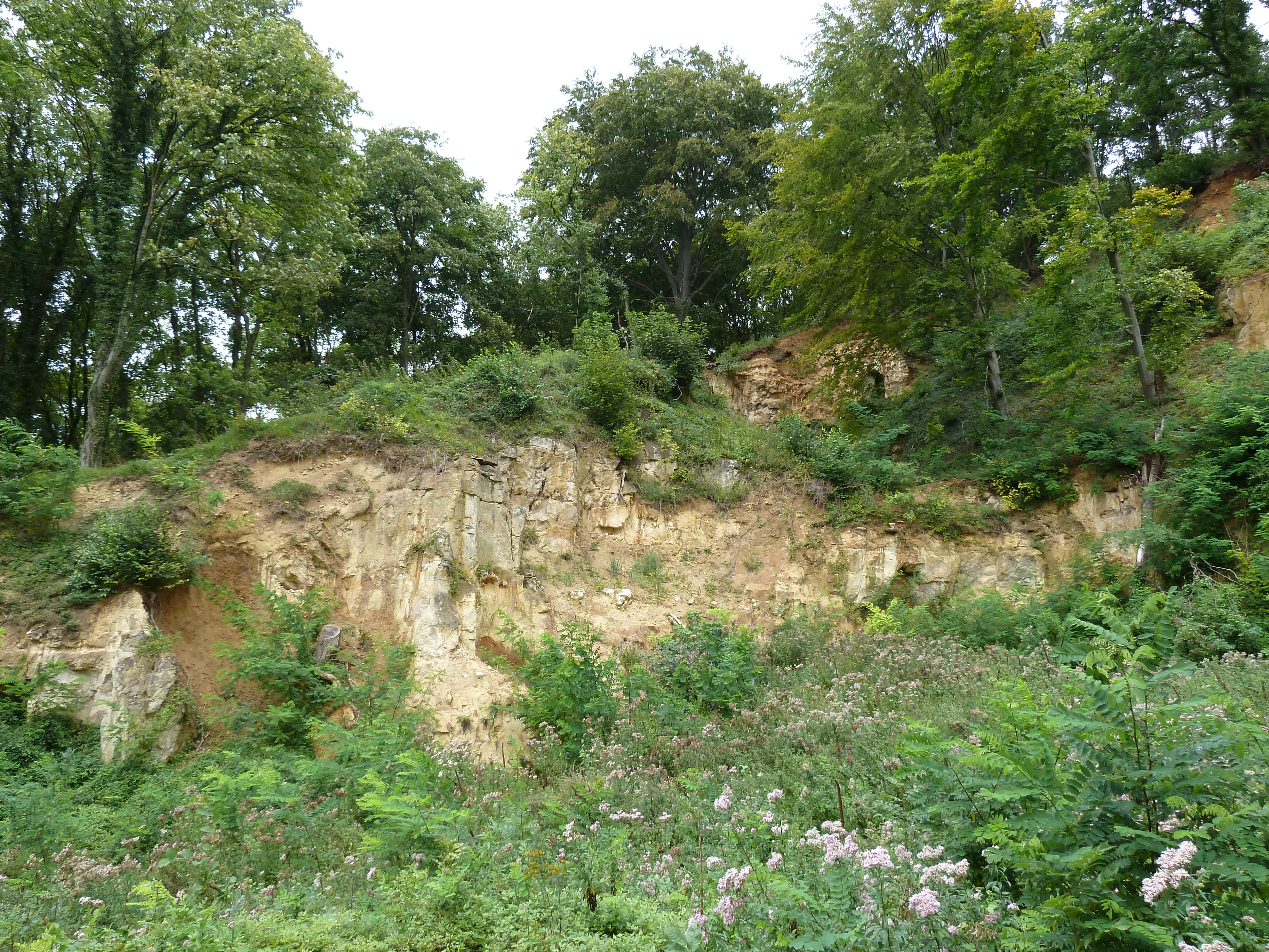 Kalkoven Biebosch, Sibbergrubbe, Sibbe, Valkenburg aan de Geul, Nederland